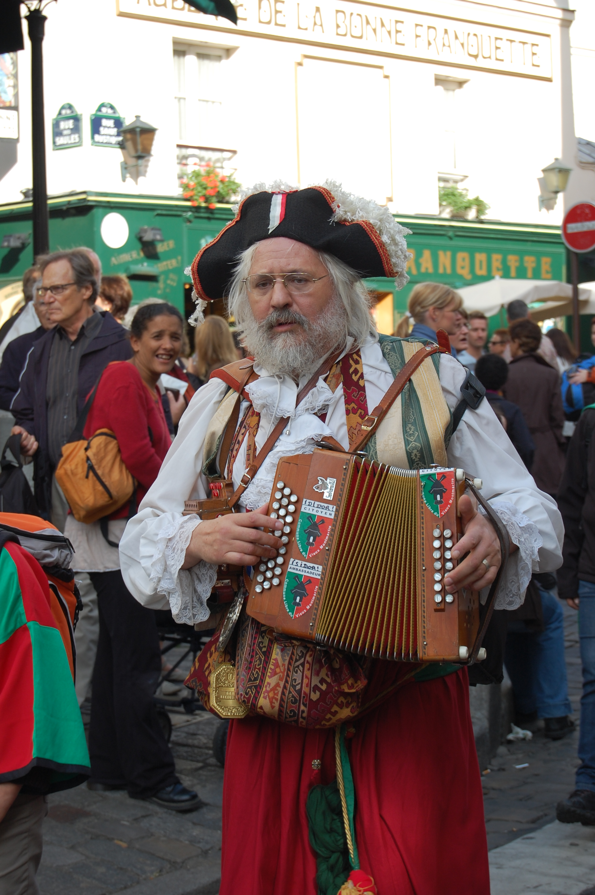 Accordéoniste du Vieux Montmartre à la Fête des Vendanges